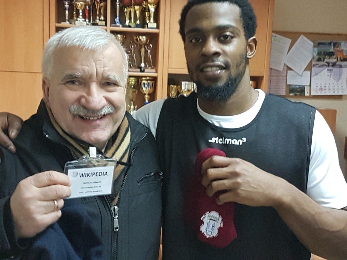 Anthony Hickey z red. Wikipedii (18.12.2018)